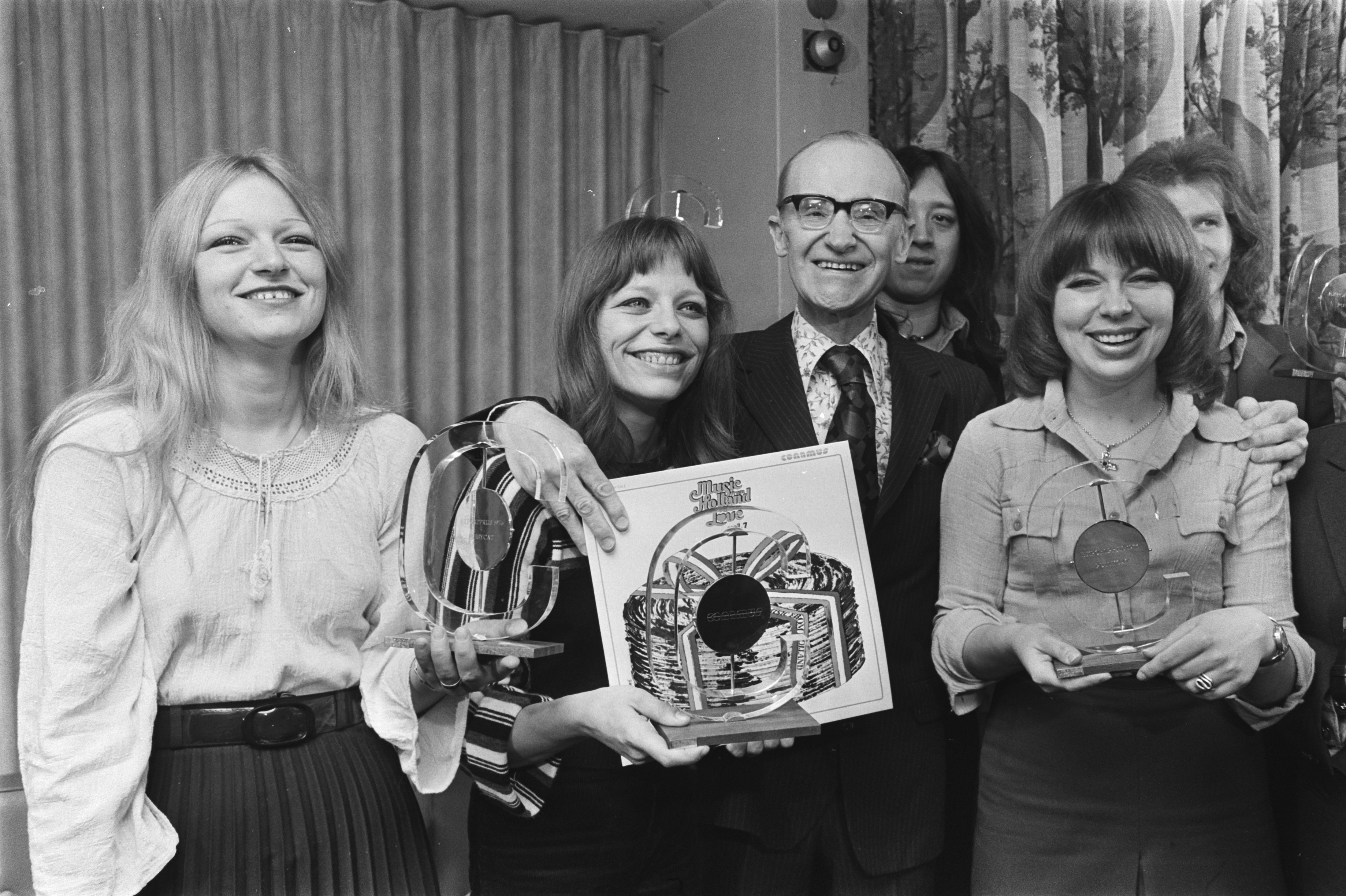 Collectie / Archief : Fotocollectie Anefo Reportage / Serie : [ onbekend ] Beschrijving : Limburgse popgroep Pussycat krijgt exportprijs van Conamu uitgereikt door Engelse ambassadeur Dir John Barnes Datum : 5 januari 1977 Trefwoorden : Popgroepen, ambassadeurs, exportprijzen Persoonsnaam : Conamus Fotograaf : Verhoeff, Bert / Anefo Auteursrechthebbende : Nationaal Archief Materiaalsoort : Negatief (zwart/wit) Nummer archiefinventaris : bekijk toegang 2.24.01.05 Bestanddeelnummer : 928-9650 Reacties Geplaatst door Maaike op 08 november 2013 - 22:36. locatie: Perscentrum Nieuwspoort Plaats: Den Haag, Zuid-Holland Persoonsnamen: Sir John Barnes